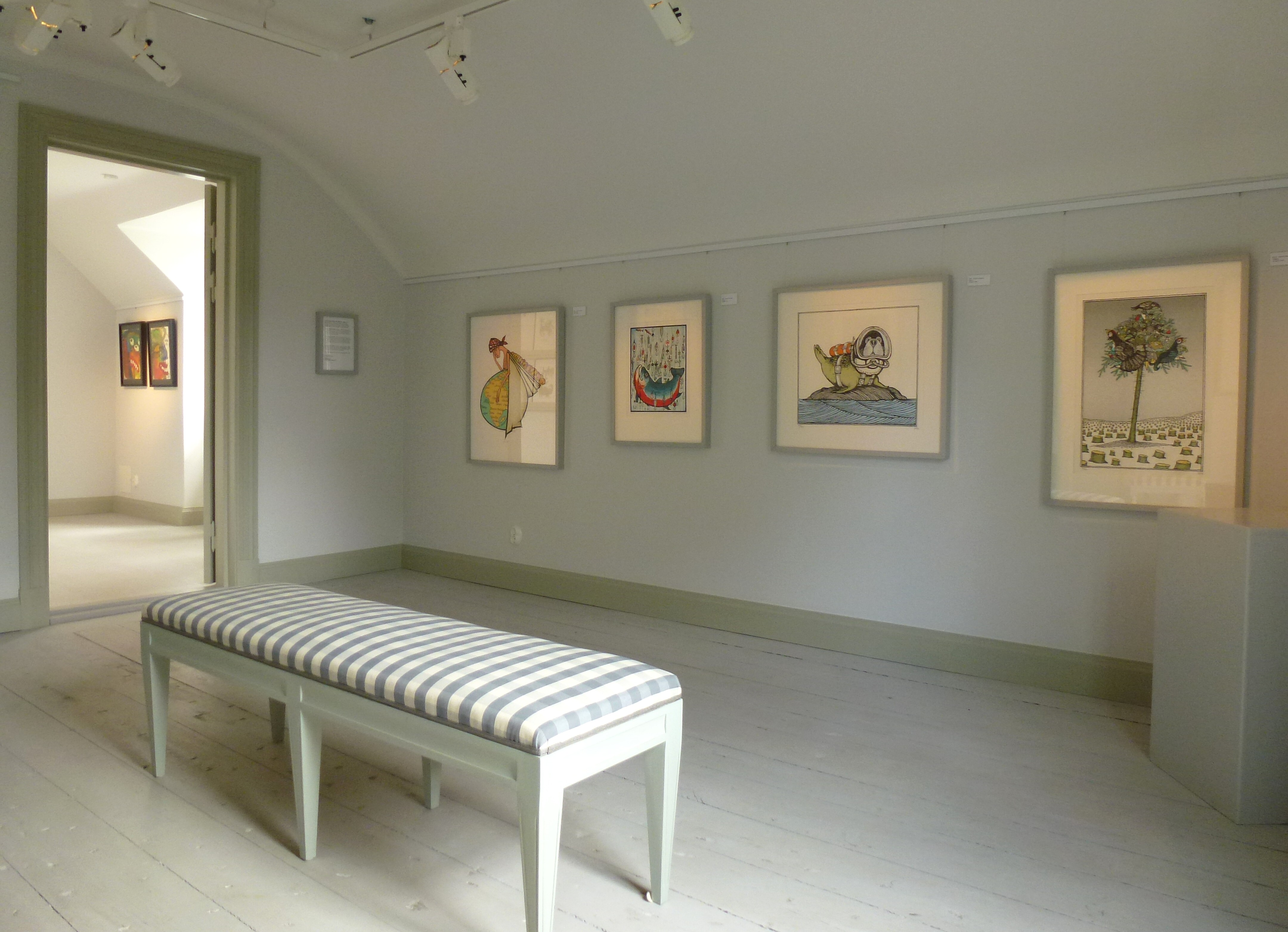 Fullersta gård interiör, konstutställning, EWK